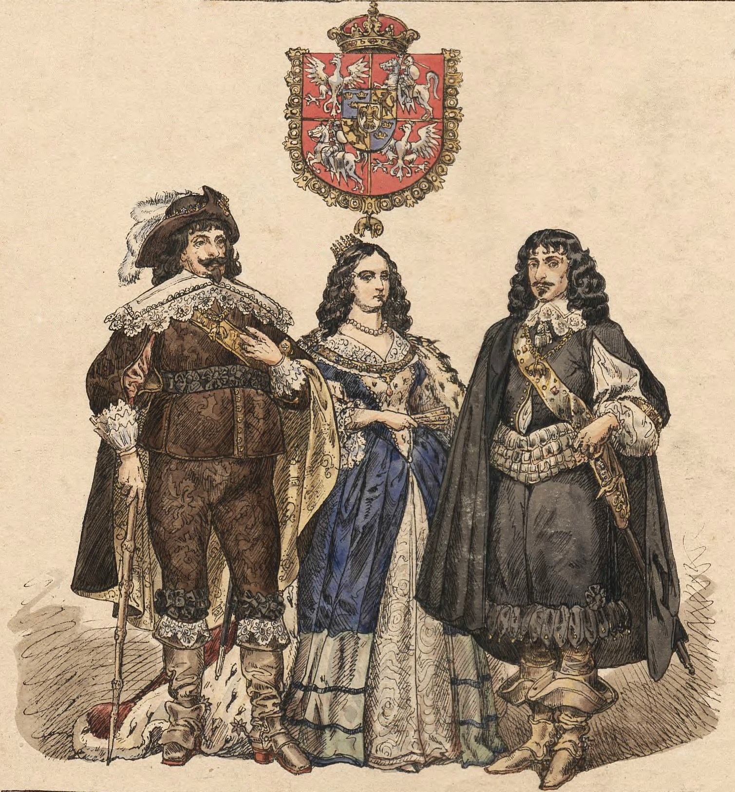 Władysław IV Waza z Ludwiką Marią i z Janem Kazimierzem